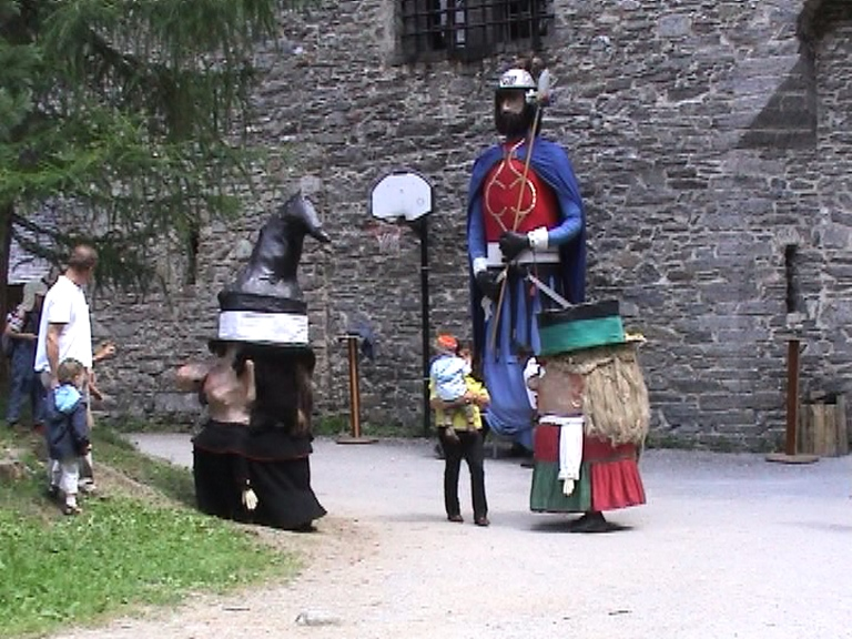 Giant Samson an its dwarfts - Finstergrün Castle, Ramingstein, Austria